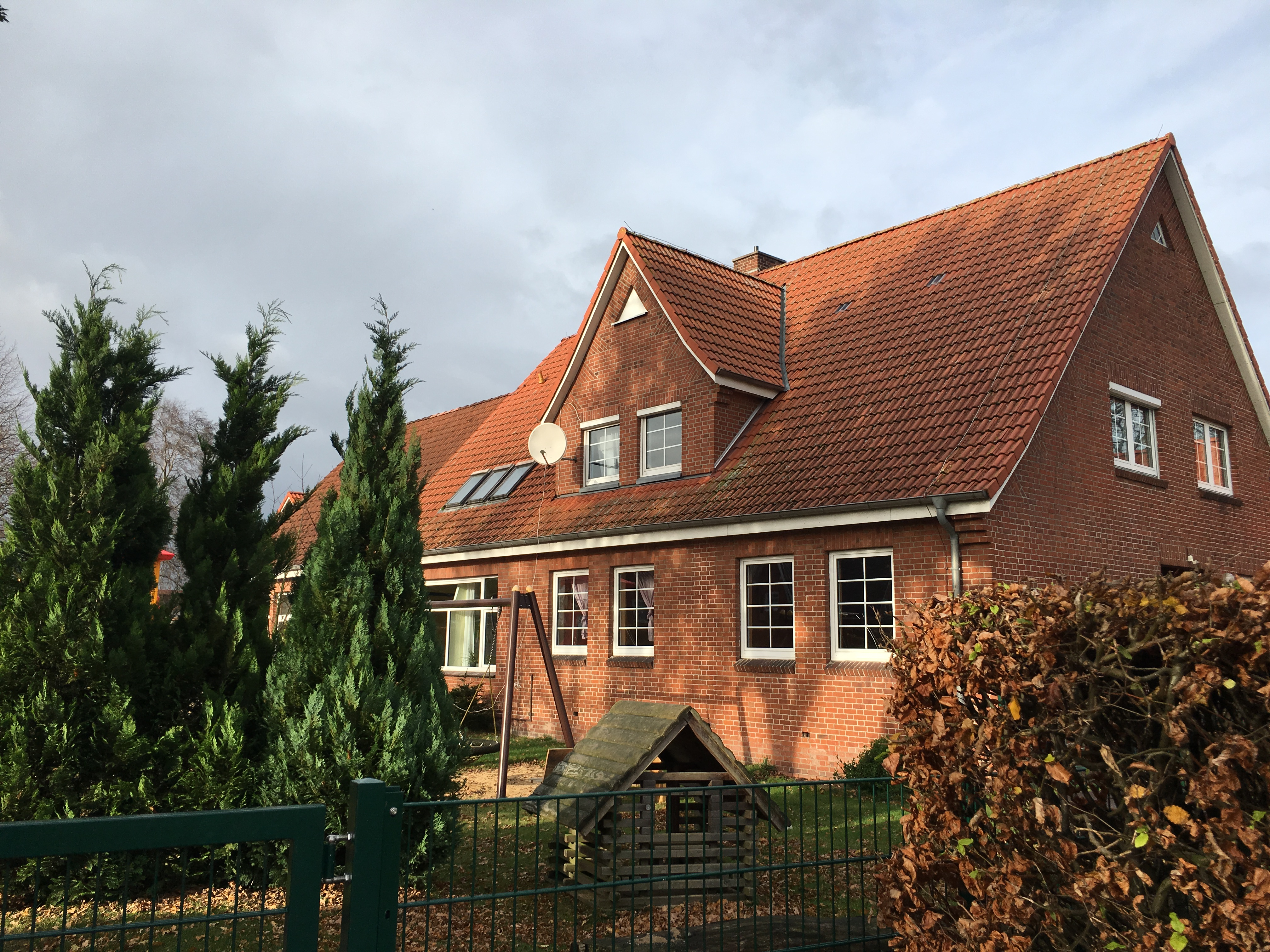 Kinnergoorn in Abbenseet